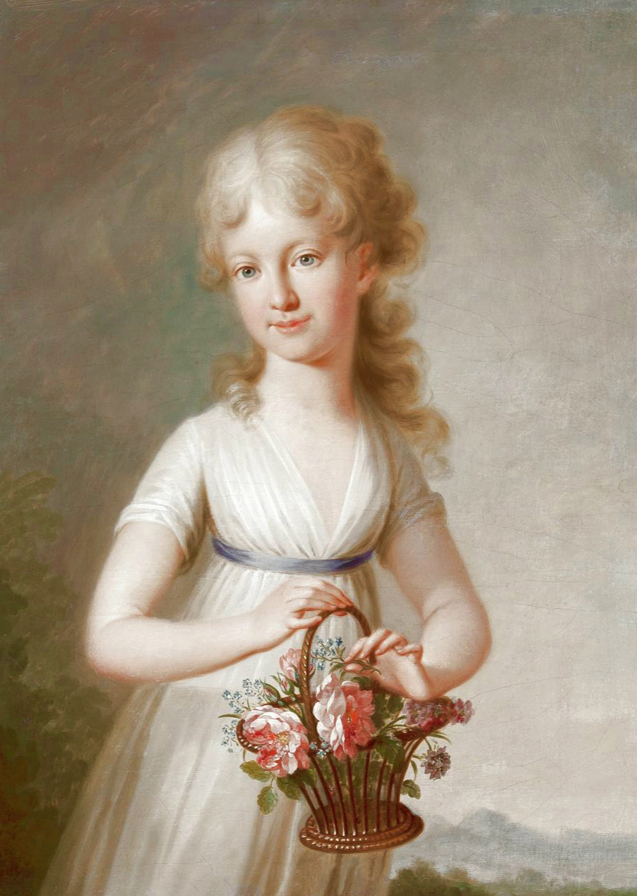 Maria Clementina Francesca d'Asburgo, arciduchessa d'Austria